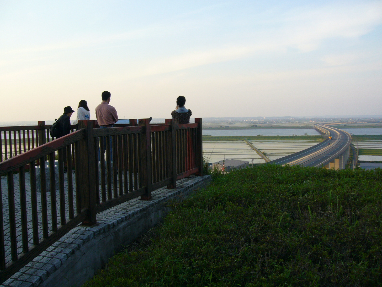 sawaraPA lookout point2,higashi-kanto-expressway,katori-city,japan.